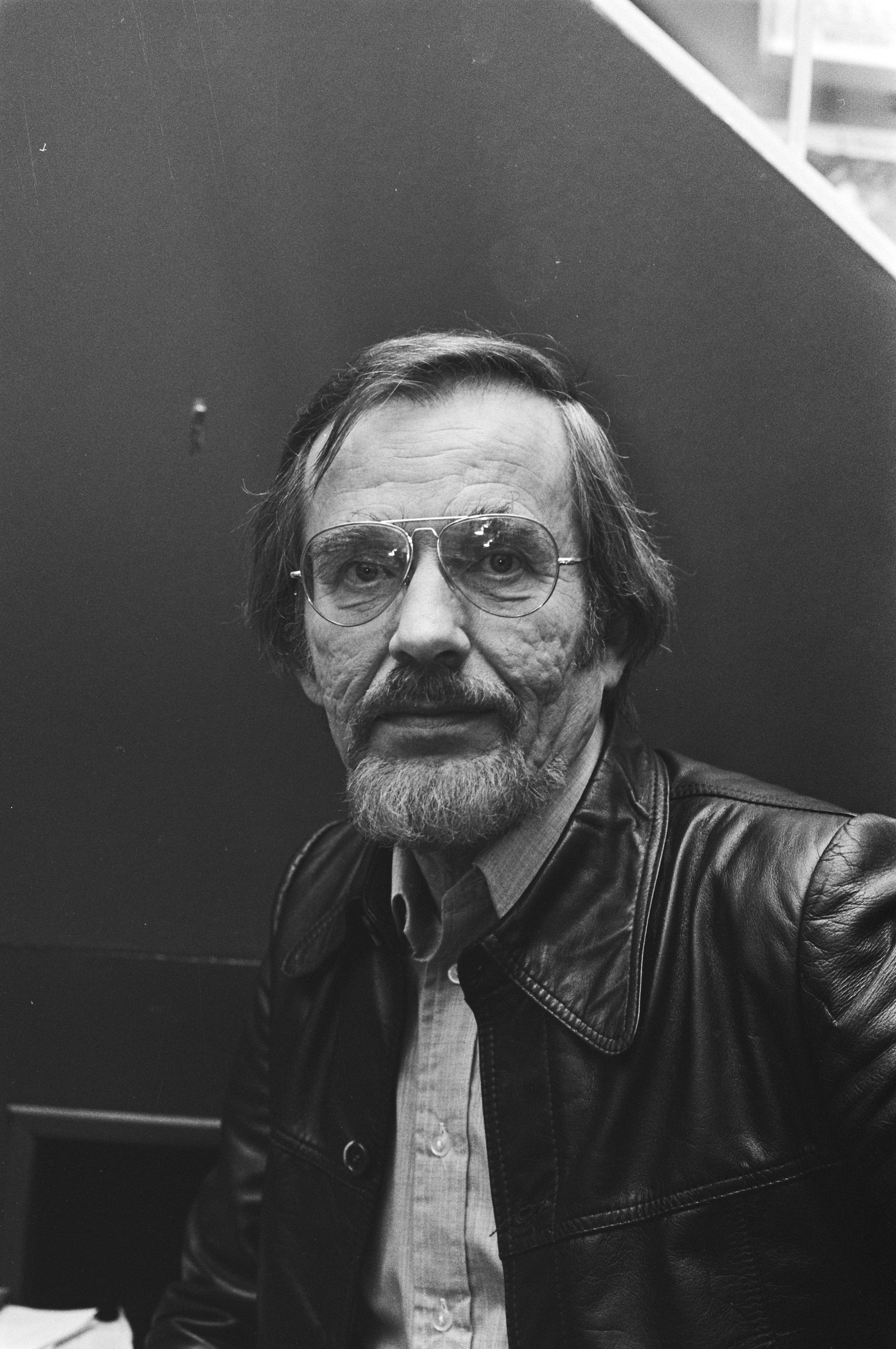 Collectie / Archief : Fotocollectie Anefo Reportage / Serie : [ onbekend ] Beschrijving : Dichters ontmoeten lezers in boekwinkel in Amsterdam; Jan Elburg , koppen Datum : 2 maart 1976 Locatie : Amsterdam, Noord-Holland Trefwoorden : DICHTERS, boekhandels Persoonsnaam : Jan Elburg Fotograaf : Bogaerts, Rob / Anefo Auteursrechthebbende : Nationaal Archief Materiaalsoort : Negatief (zwart/wit) Nummer archiefinventaris : bekijk toegang 2.24.01.05 Bestanddeelnummer : 928-4440